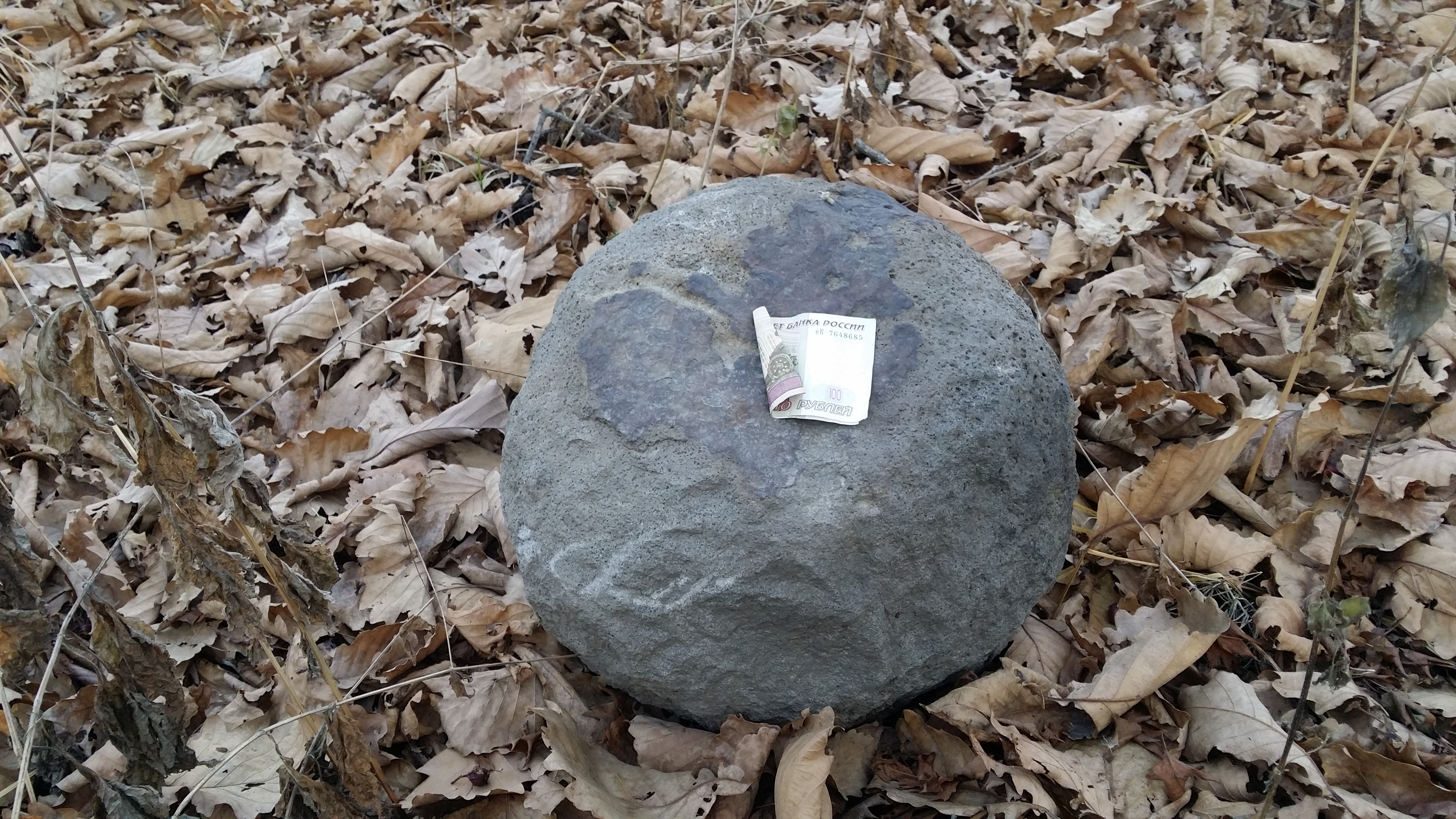 Снаряд камнемётной машины джурдженей